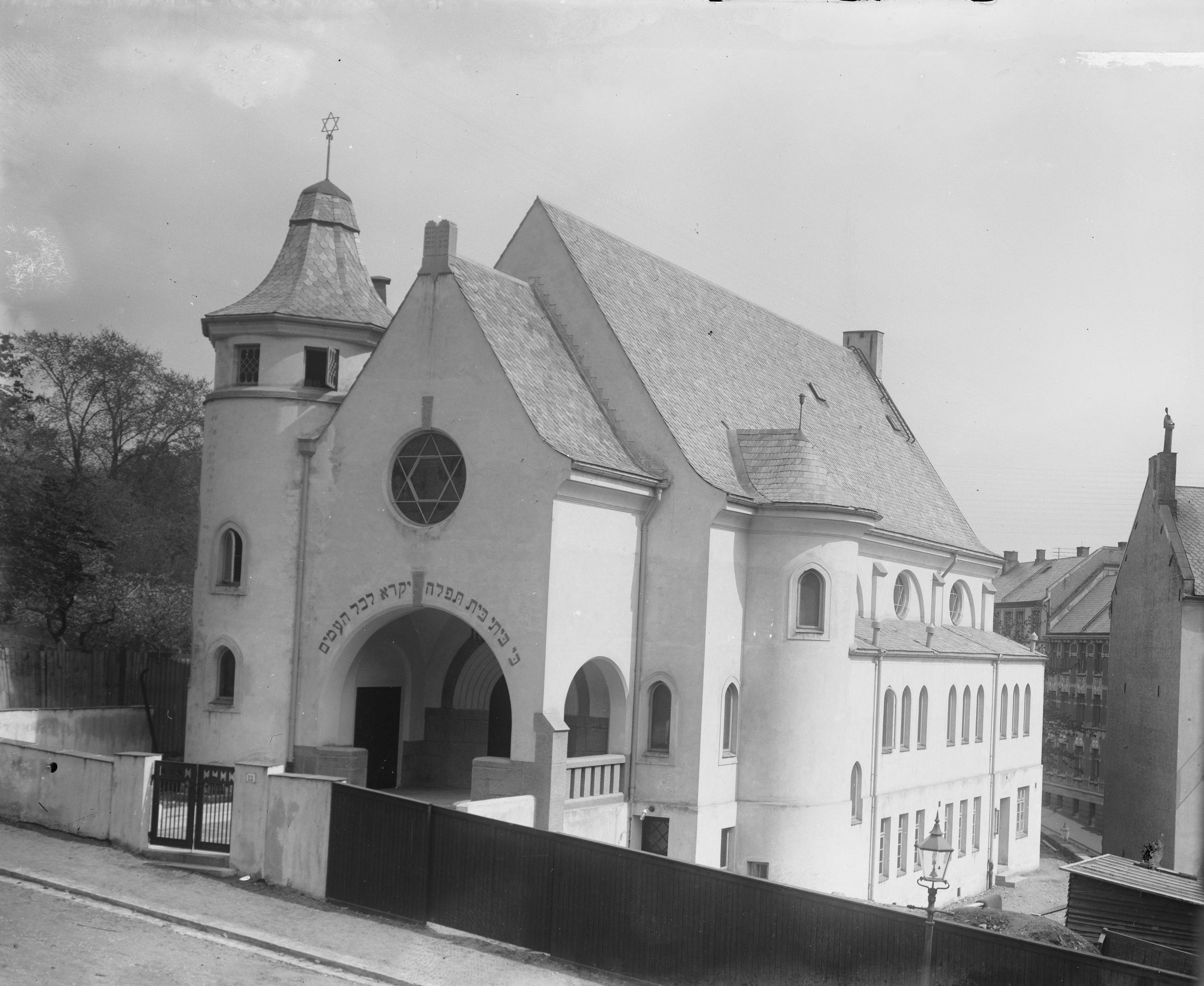 Bildet er hentet fra Nasjonalbibliotekets bildesamling. Anmerkninger til bildet var: Påskrift arkivark: Jødenes Synagoge [Nyere påskrift: Bergstien 13] Eldste arkivnummer: 354 St. Hanshaugen, Oslo, Oslo